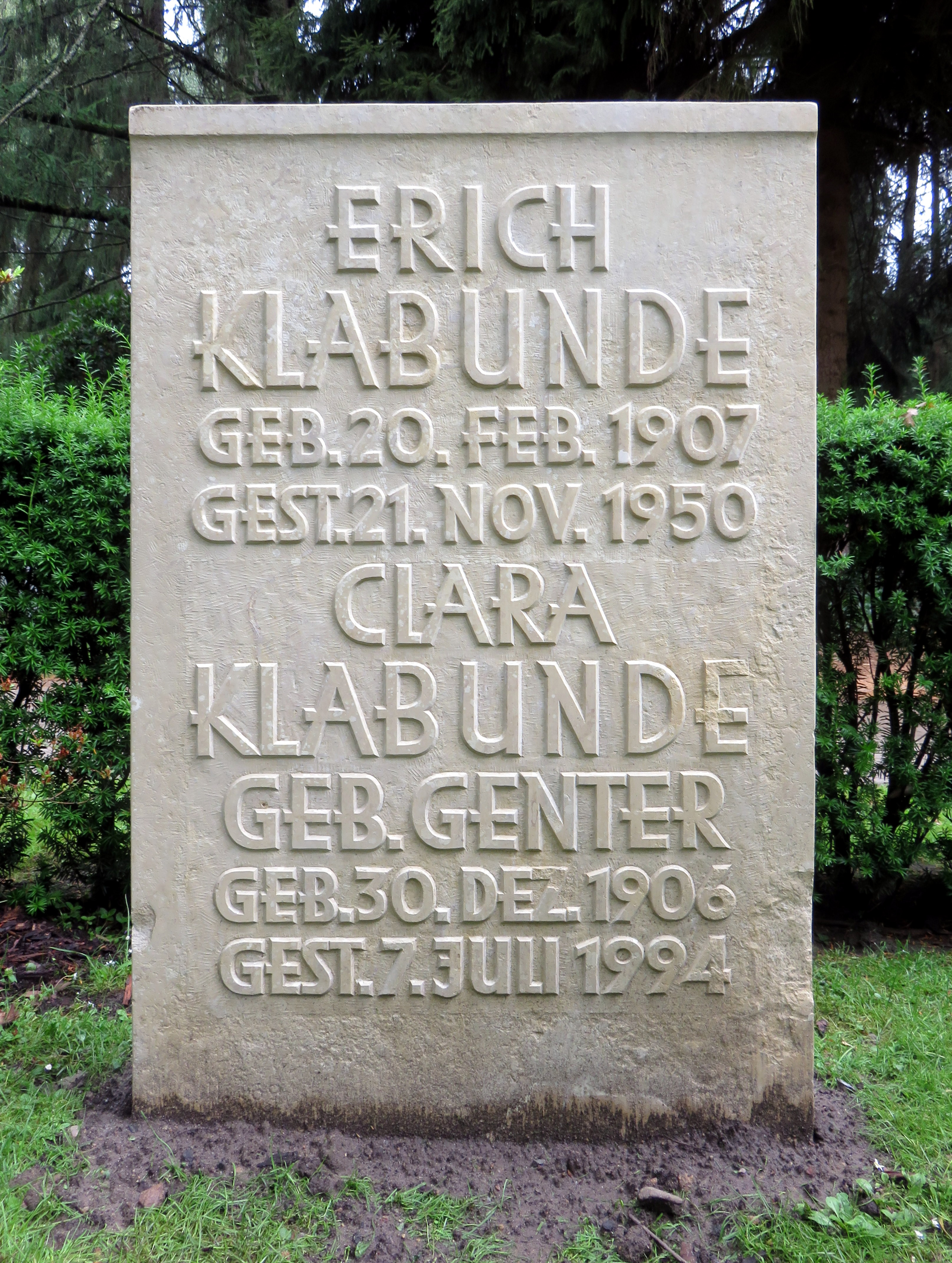 Historischer Grabstein der deutschen Juristin und ersten Gerichtspräsidentin der Bundesrepublik Deutschland Clara Klabunde im Bereich des Gartens der Frauen auf dem Ohlsdorfer Friedhof.